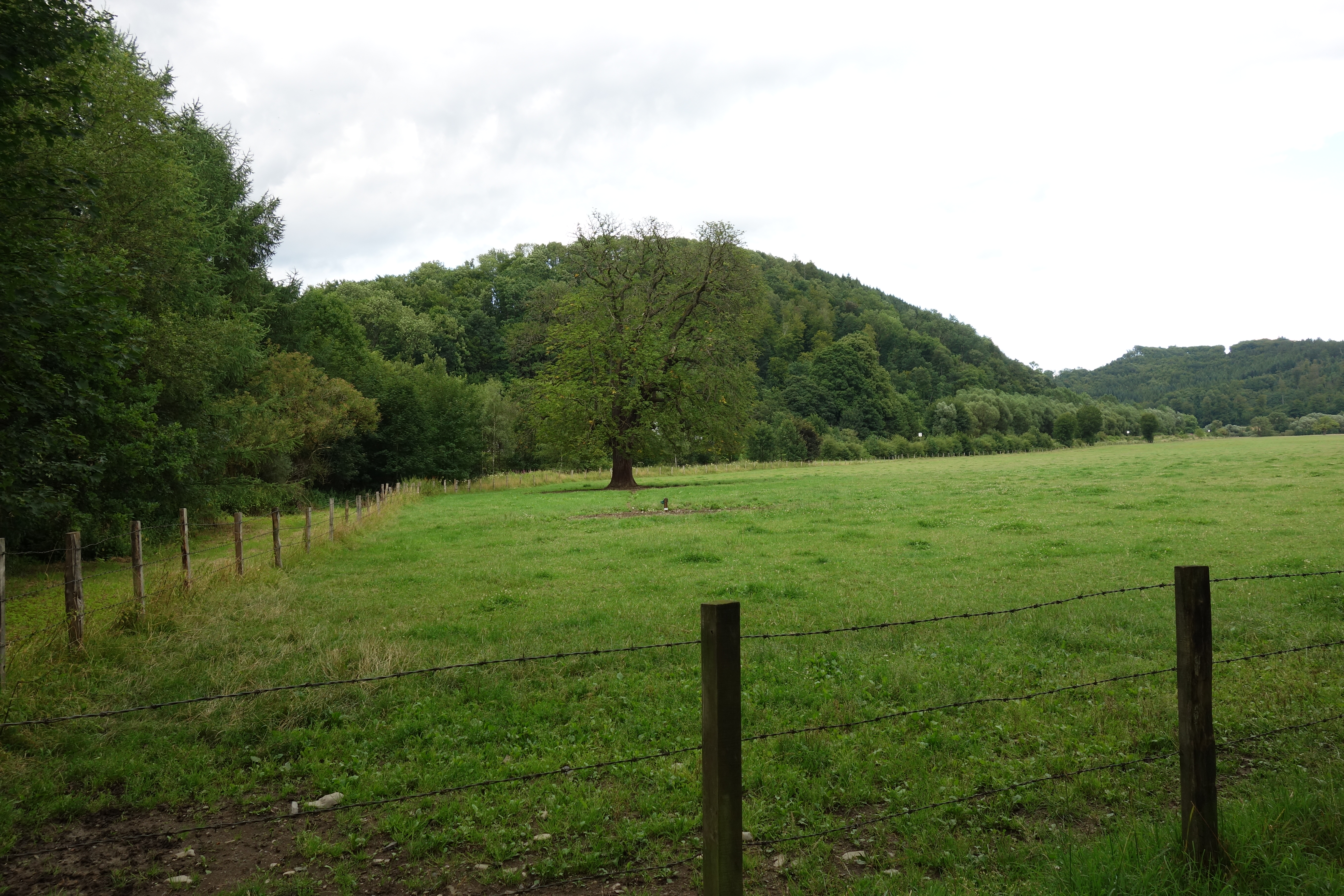 Naturschutzgebiet Ruhrtal bei Laer; Blick nach Osten Nähe Brücke südlich Stockhausen. Hügel links gehört zum NSG Schneisenberg.